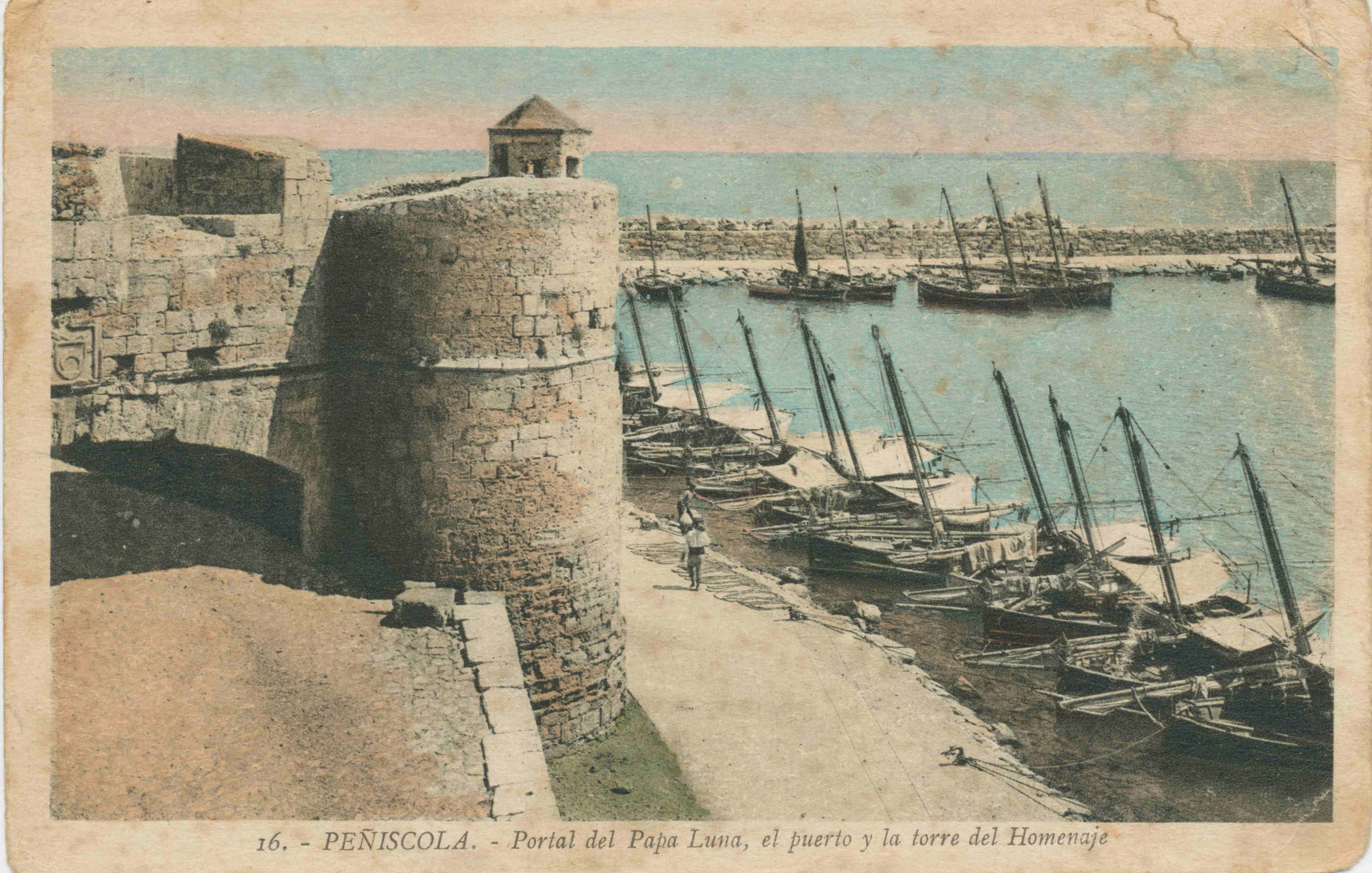 Peñiscola - porte Sant-Pere et port (vers 1930).